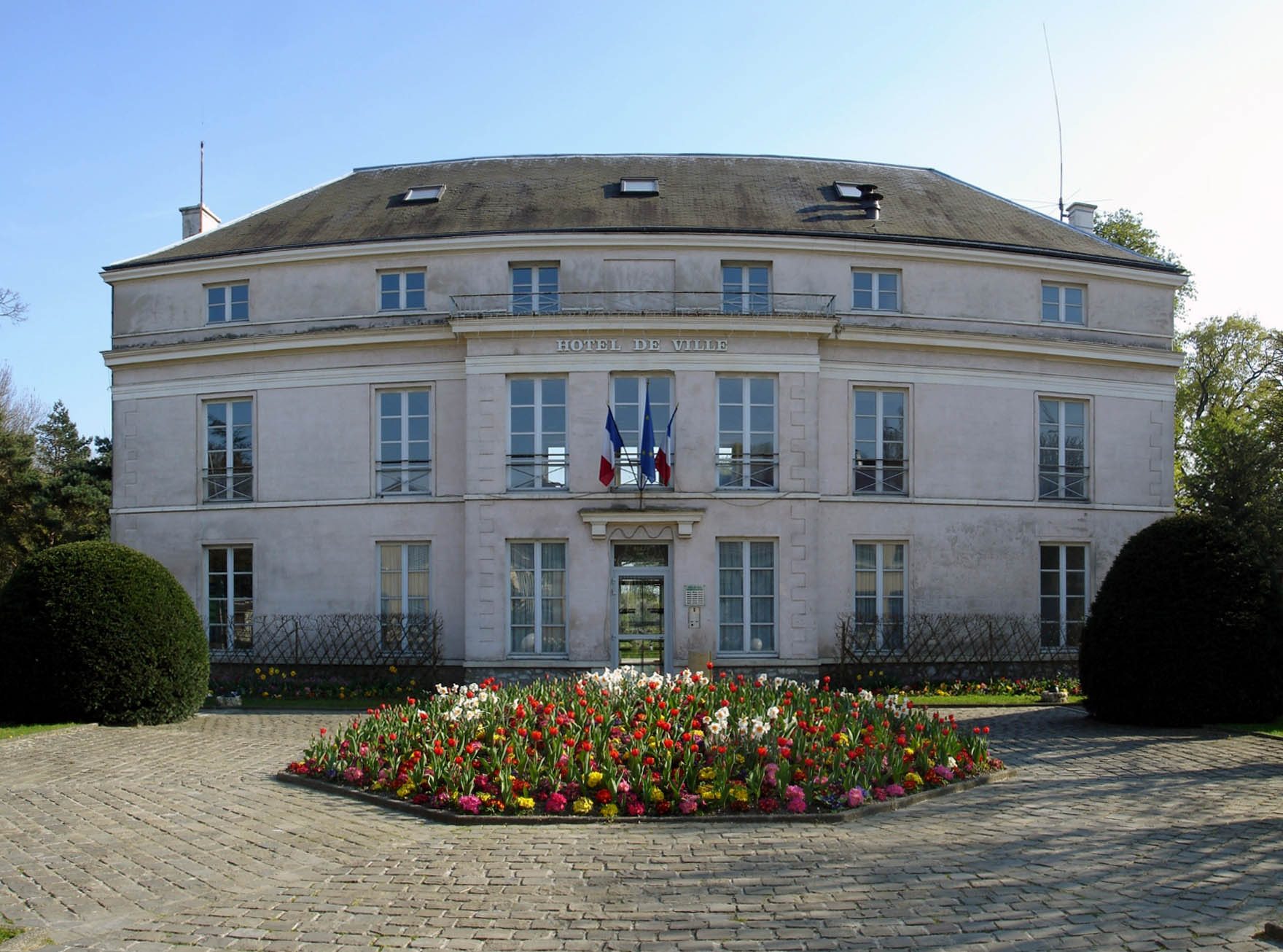 Mairie de Courtry (Seine-et-Marne), France